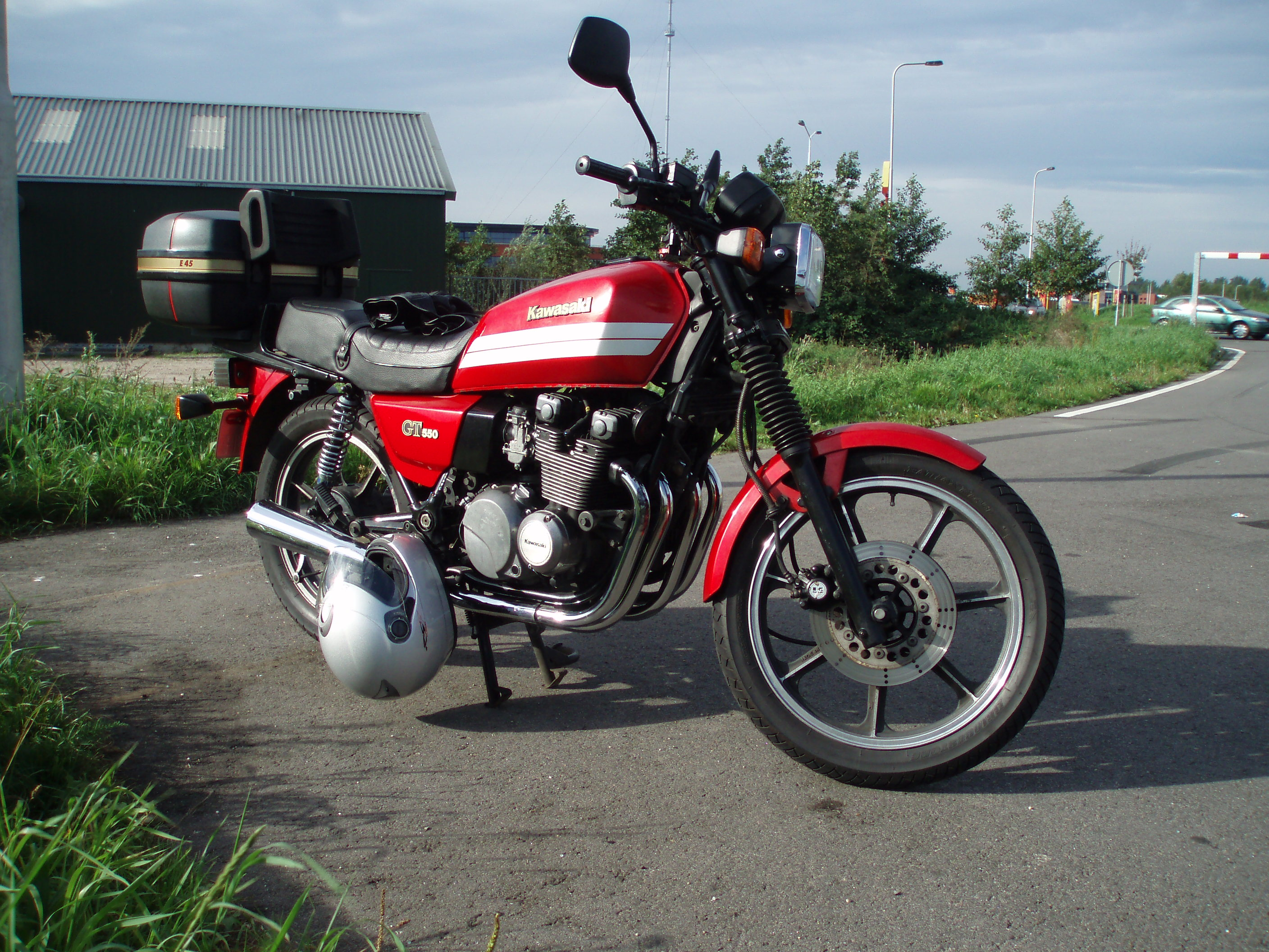 Kawasaki Z 550 GT (G7) bouwjaar 1991